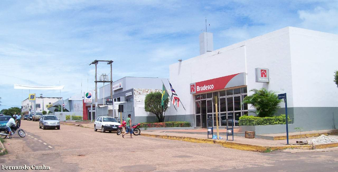 Centro comercial e bancário. Açailândia Maranhão.